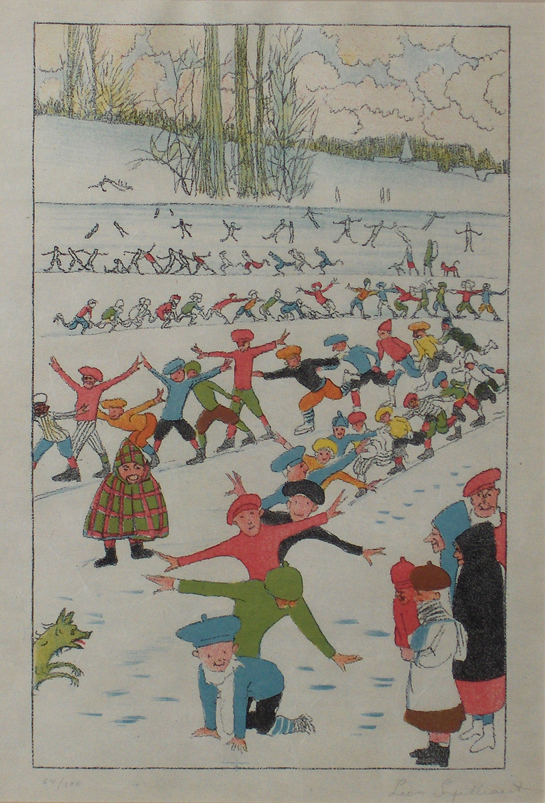 "Les plaisirs d'hiver" (1918); Schaatsende kinderen; meerkleurendruk in de reeks "Collection du Petit Artiste" door de Belgische kunstenaar Léon Spilliaert; collectie Mu.ZEE, Oostende